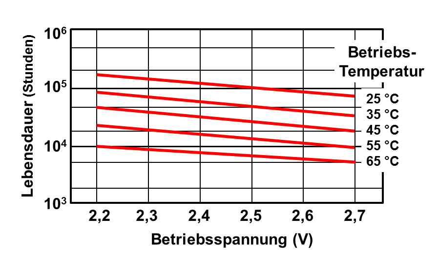 Lebensdauerkurven von Doppelschichtkondensatoren mit der Darstellung der Temperatur- und der Spannungsabhängigkeit